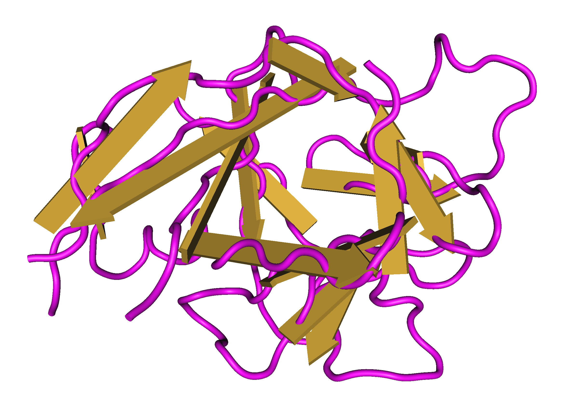 2ILA Interleukin 1 Alpha